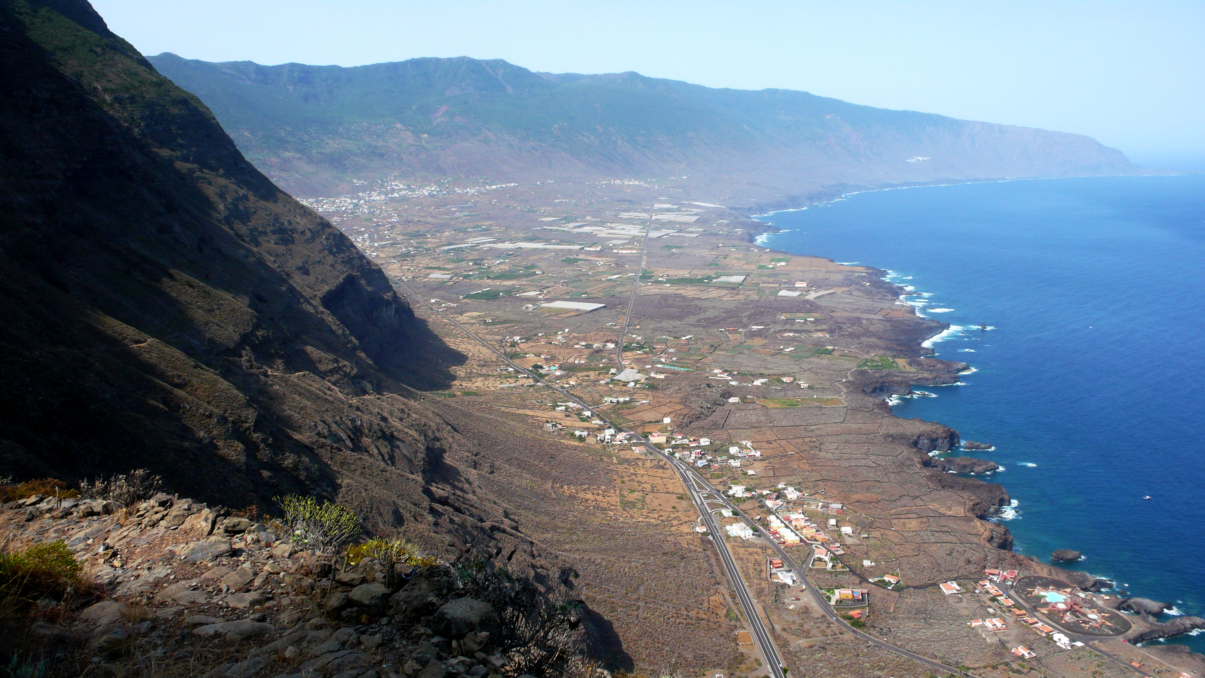 El camino está en muy mal estado, desaparecido por tramos.